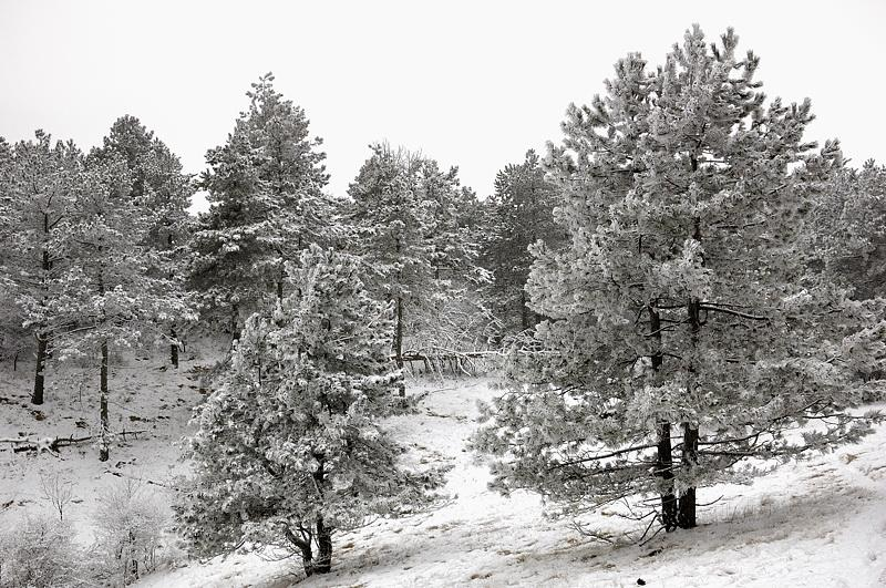 Кедровая падь